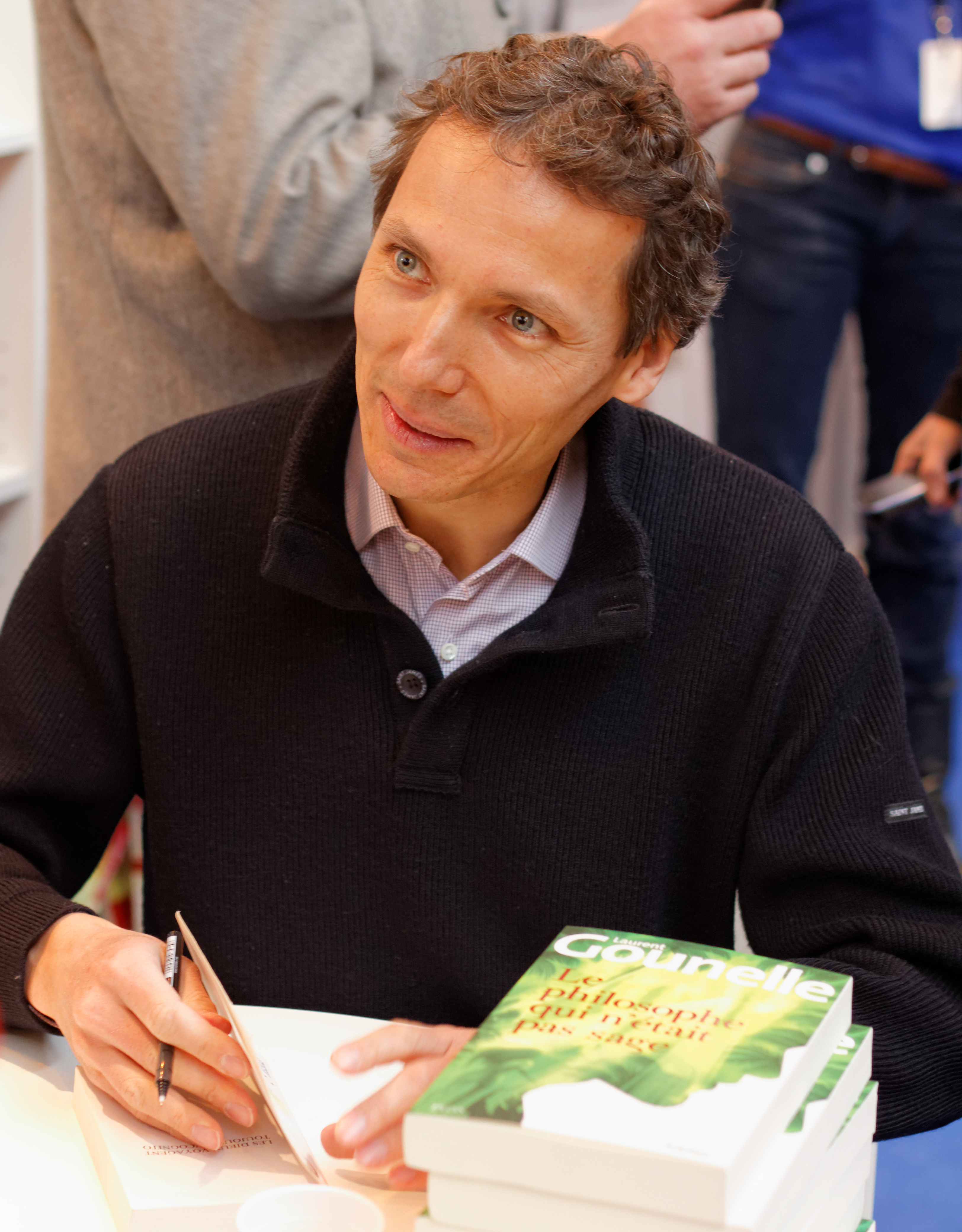 Laurent Gounelle, salon du livre de Paris, 2013